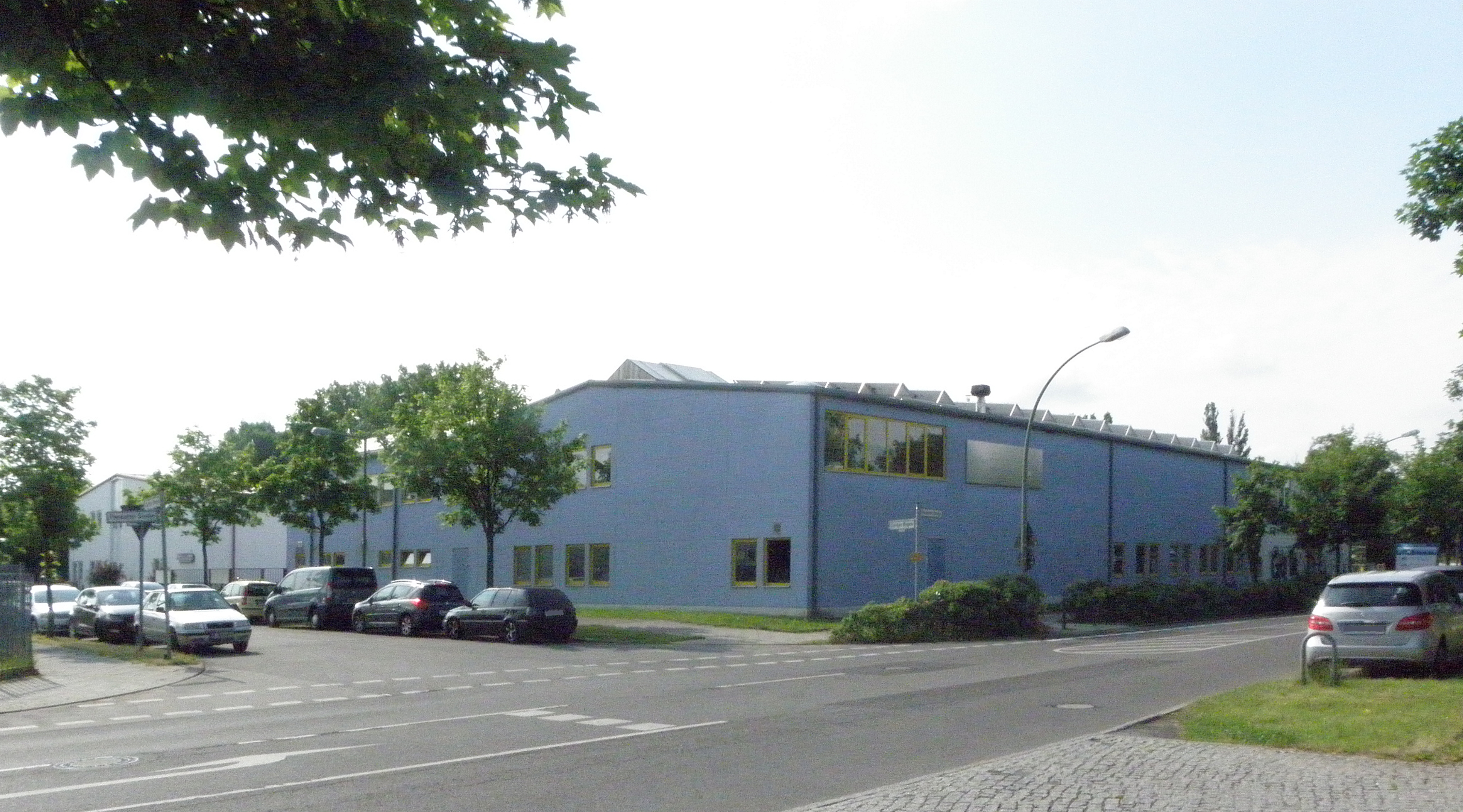 Verwaltungs- und Produktionsgebäude der Firma fittkau metallbau + kunstschmiede